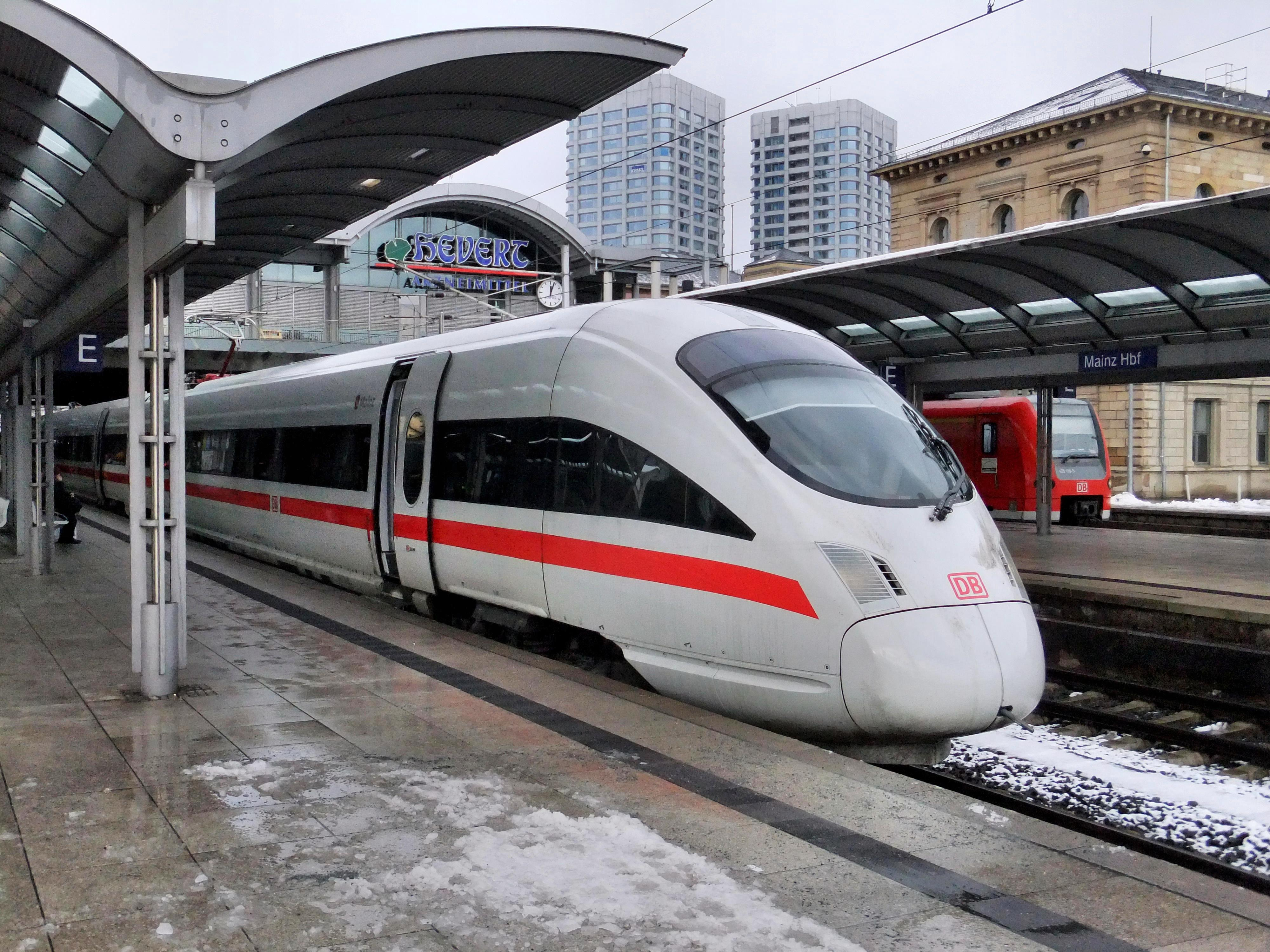 Der ICE T Mainz im Mainzer Hauptbahnhof in Rheinhessen in Rheinland-Pfalz (Deutschland) auf dem Weg nach Dresden Hauptbahnhof, im Hintergrund die Mainzer Bonifazius-Türme